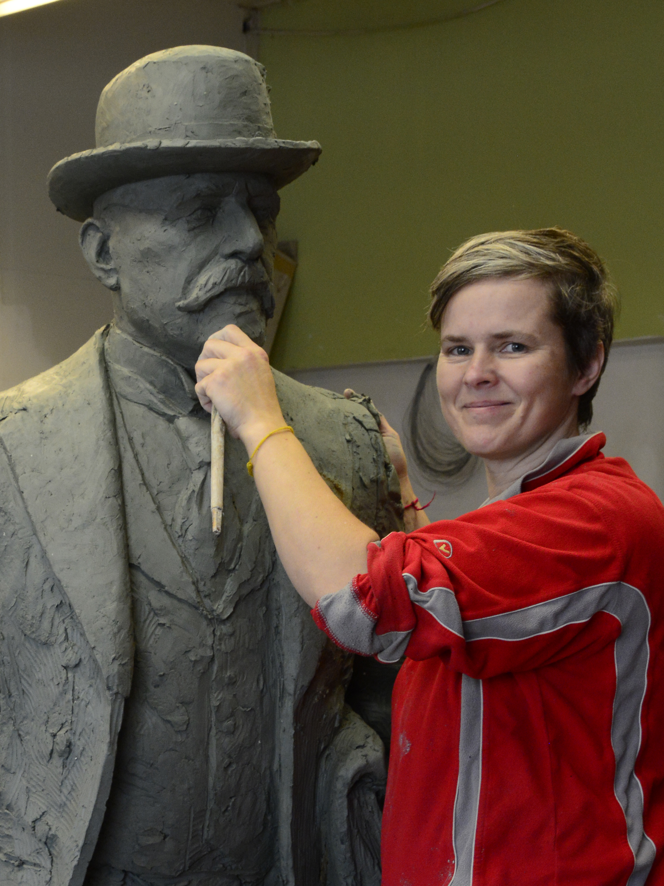 Jaan Poska kuju valmib skulptor Elo Liivi käe all. Foto: Urmas Kaldaru